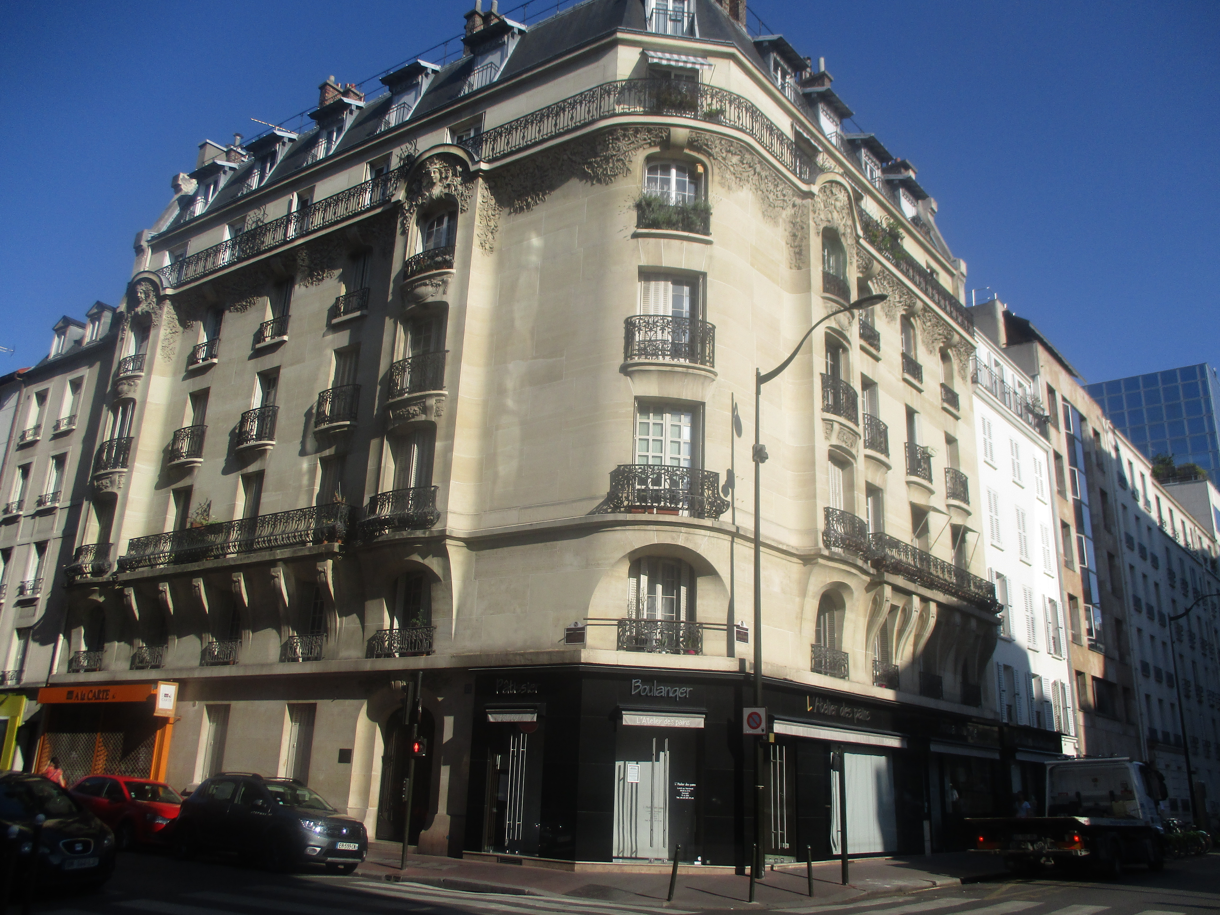 32 rue Louise-Michel à l'angle de la rue Anatole-France, Levallois-Perret.